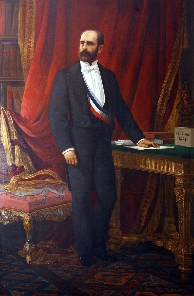 Federico Errázuriz Zañartu Periodo: 18 de septiembre de 1871 - 18 de septiembre de 1876 Autor: Anónimo Propiedad: Museo Histórico Nacional